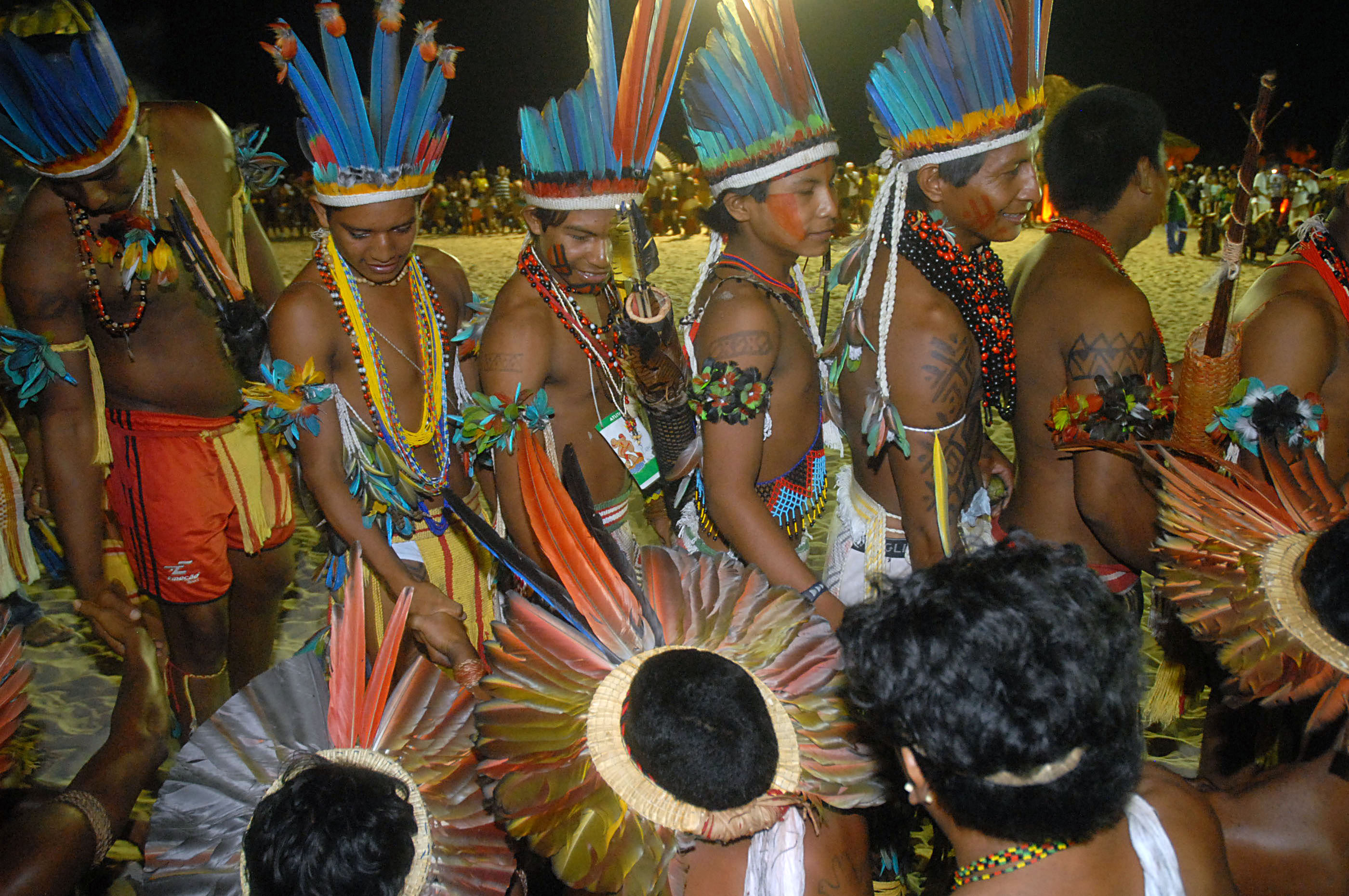 Cerimônia de encerramento da nona edição dos Jogos dos Povos Indígenas (Olinda PE)